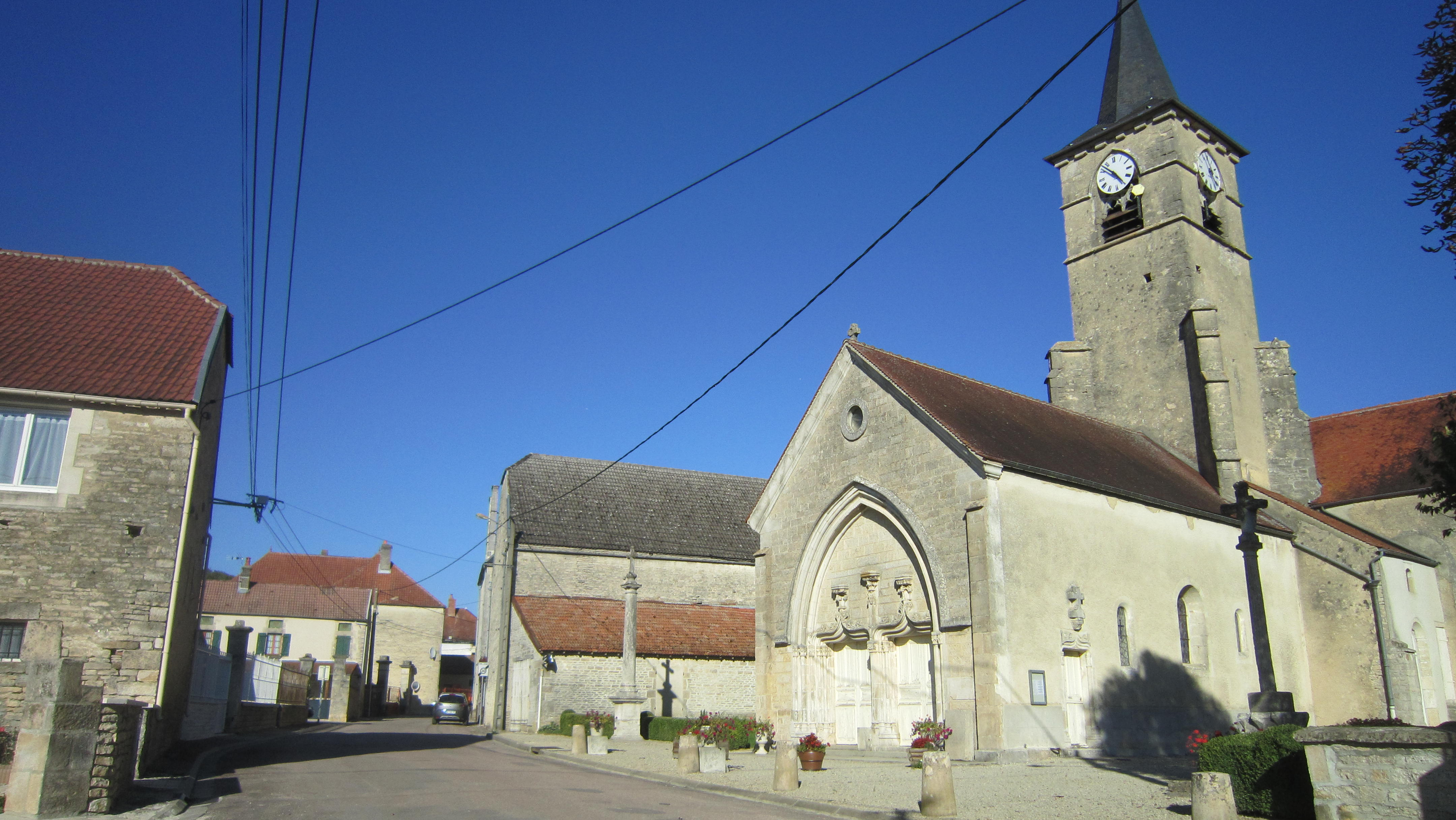 Courban (Côte-d'Or)